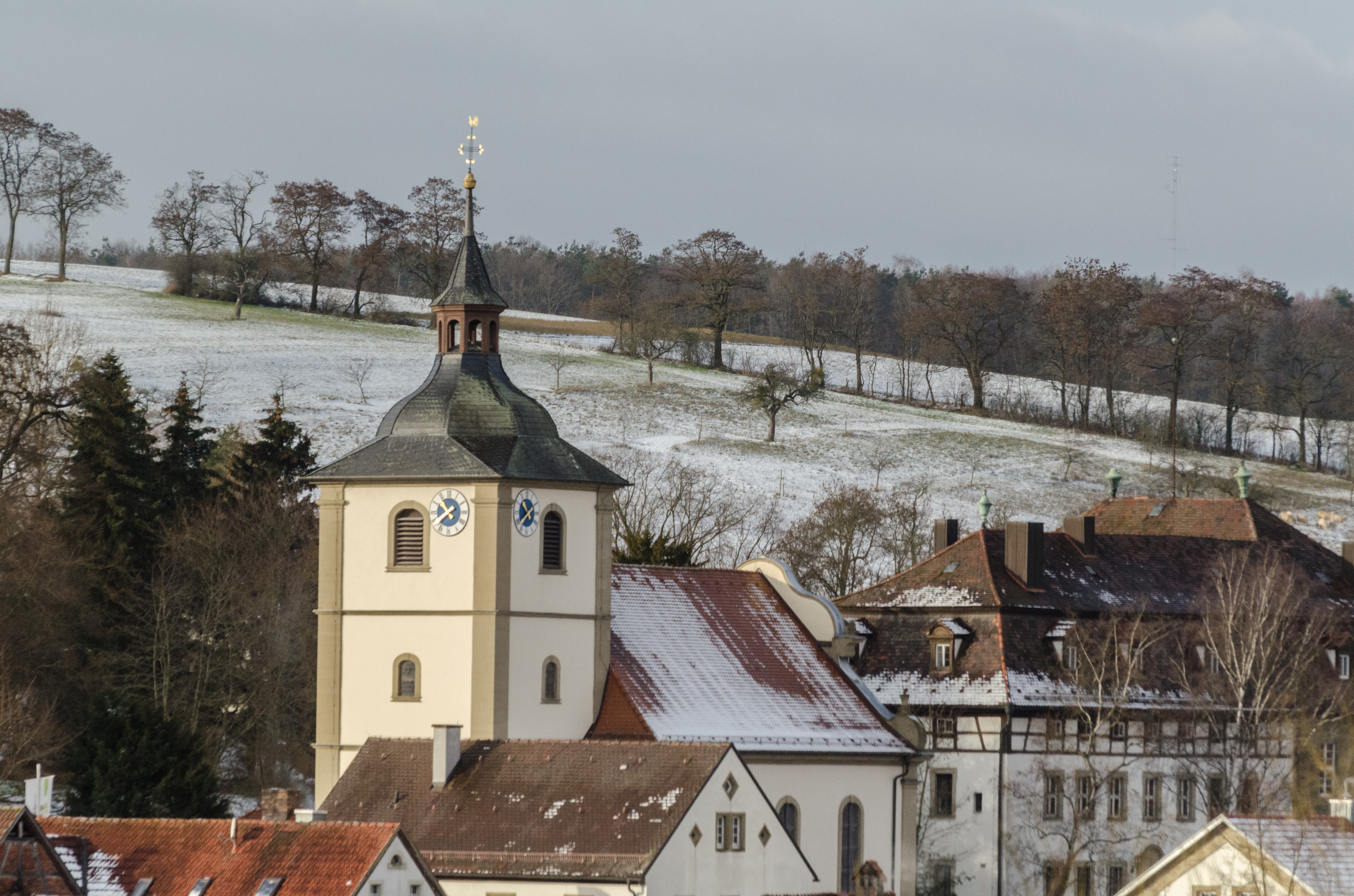 Euerbach, Obbach, Evangelische Pfarrkirche und Schloss